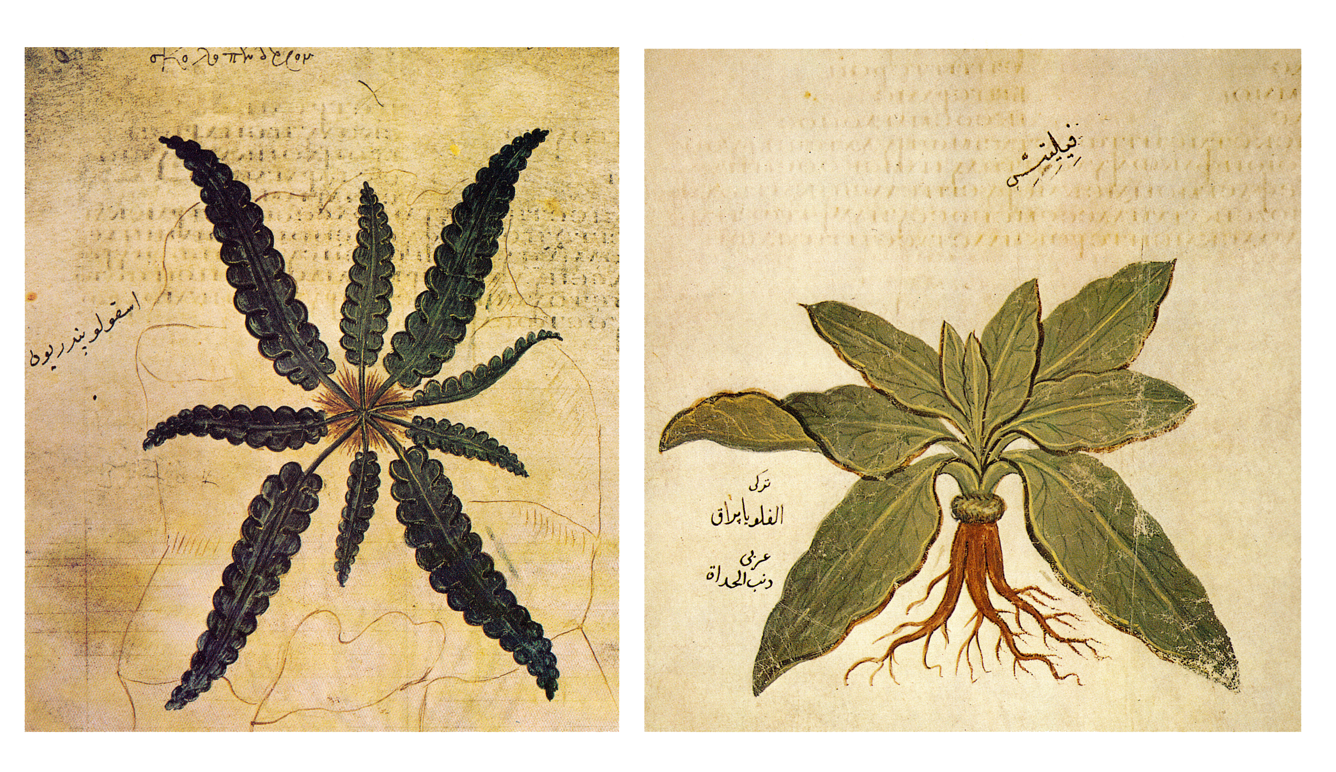 Abbildung von Scolopen drion und Phyllitis